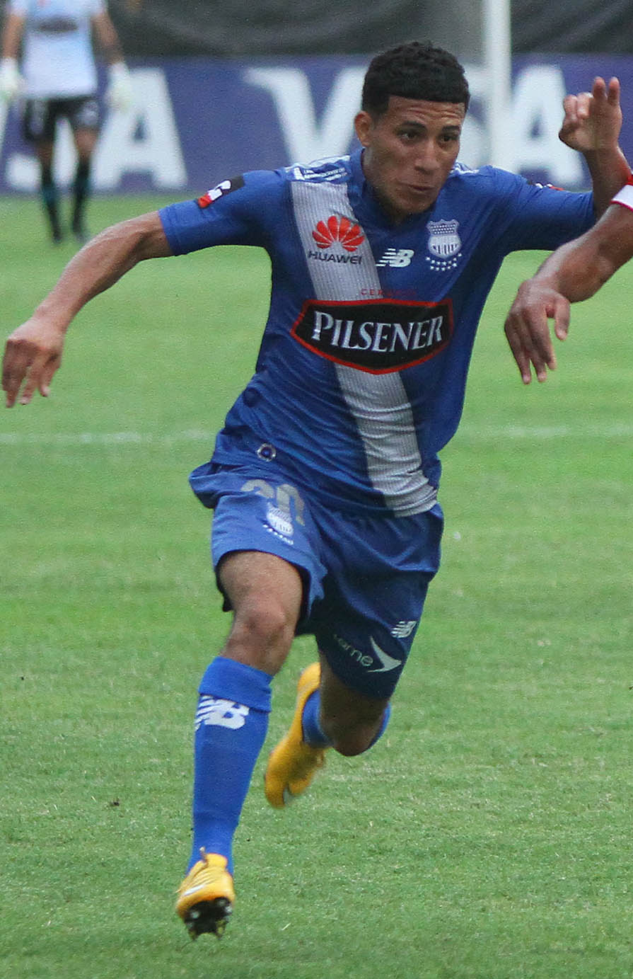 Guayaquil, Miércoles 18 de marzo del 2015 (ANDES).-Emelec se enfrenta a Internacional de Brasil por la Copa Libertadores Foto:César Muñoz/ANDES